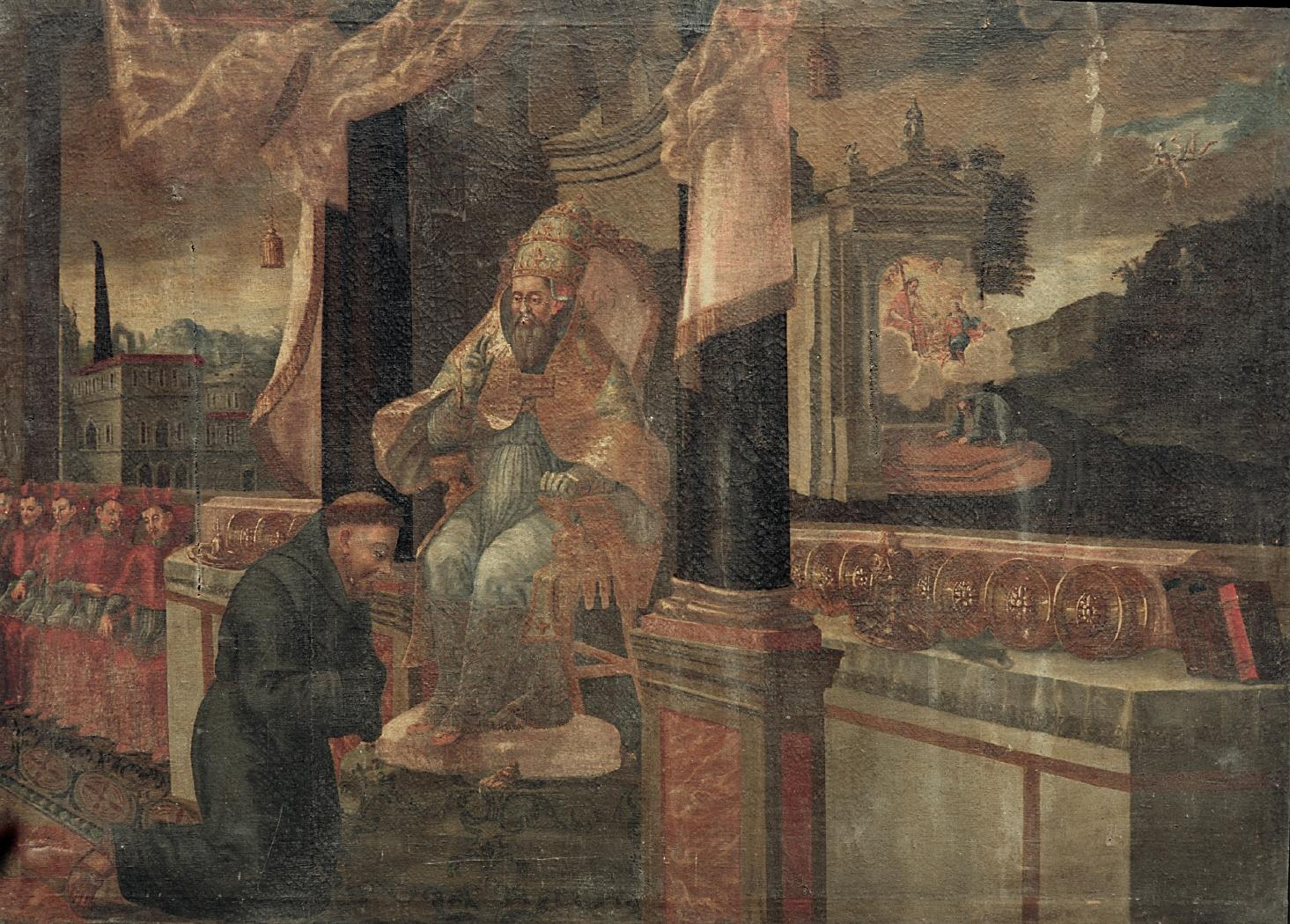 La obra representa al papa aprobando la regla de la Orden de los franciscanos.